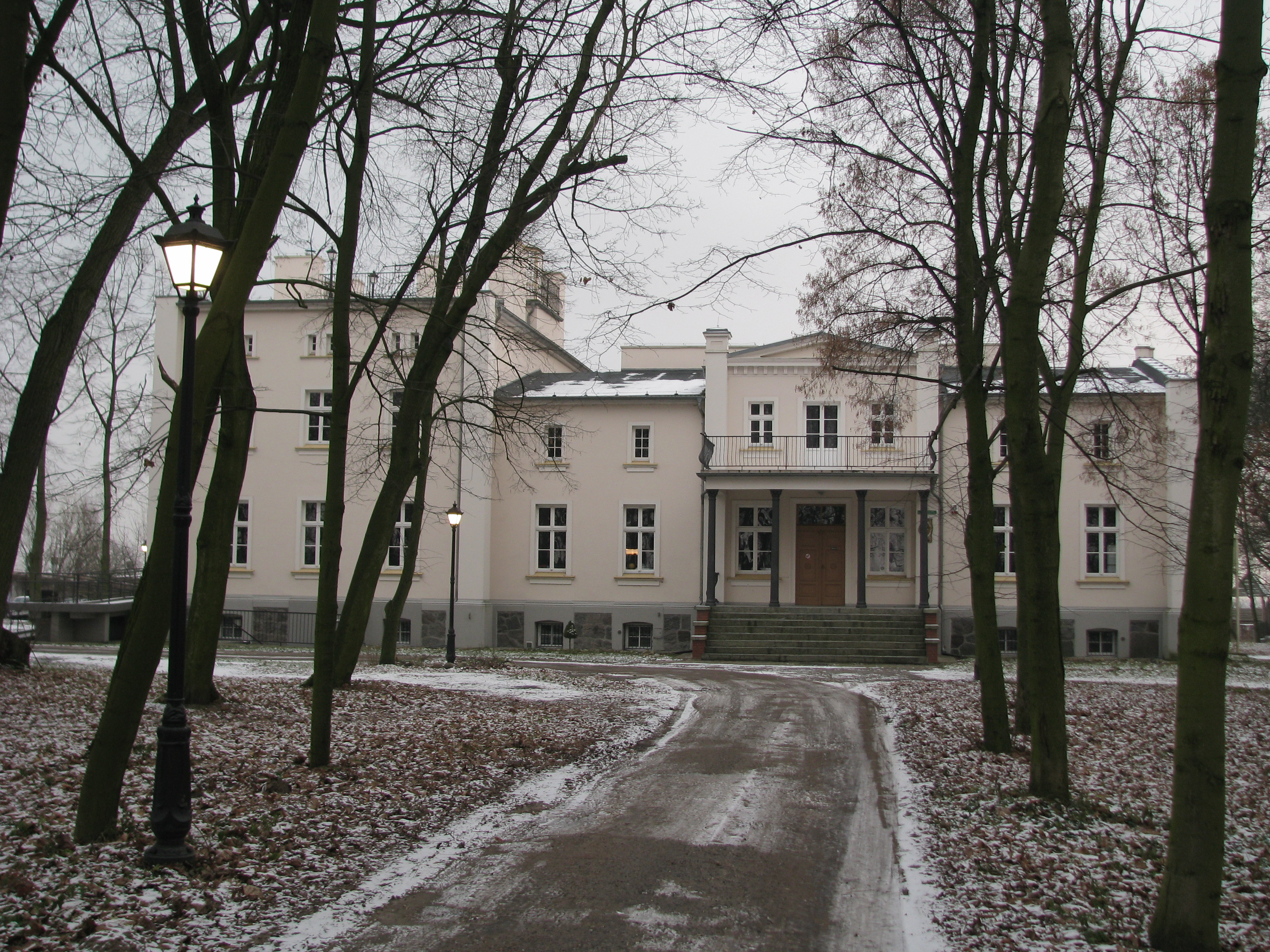 Dwór w Lądzie,gmina lądek, powiat słupecki,grudzień 2008 r.